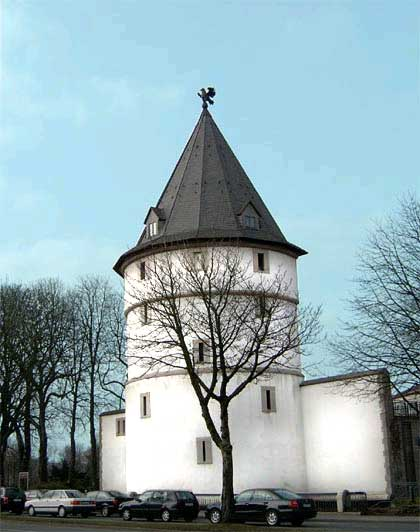 Adlerturm in Dortmund. Von , mind. GNU-FDL, "Die Verwertung dieses Motivs ist an keine Auflagen gebunden."